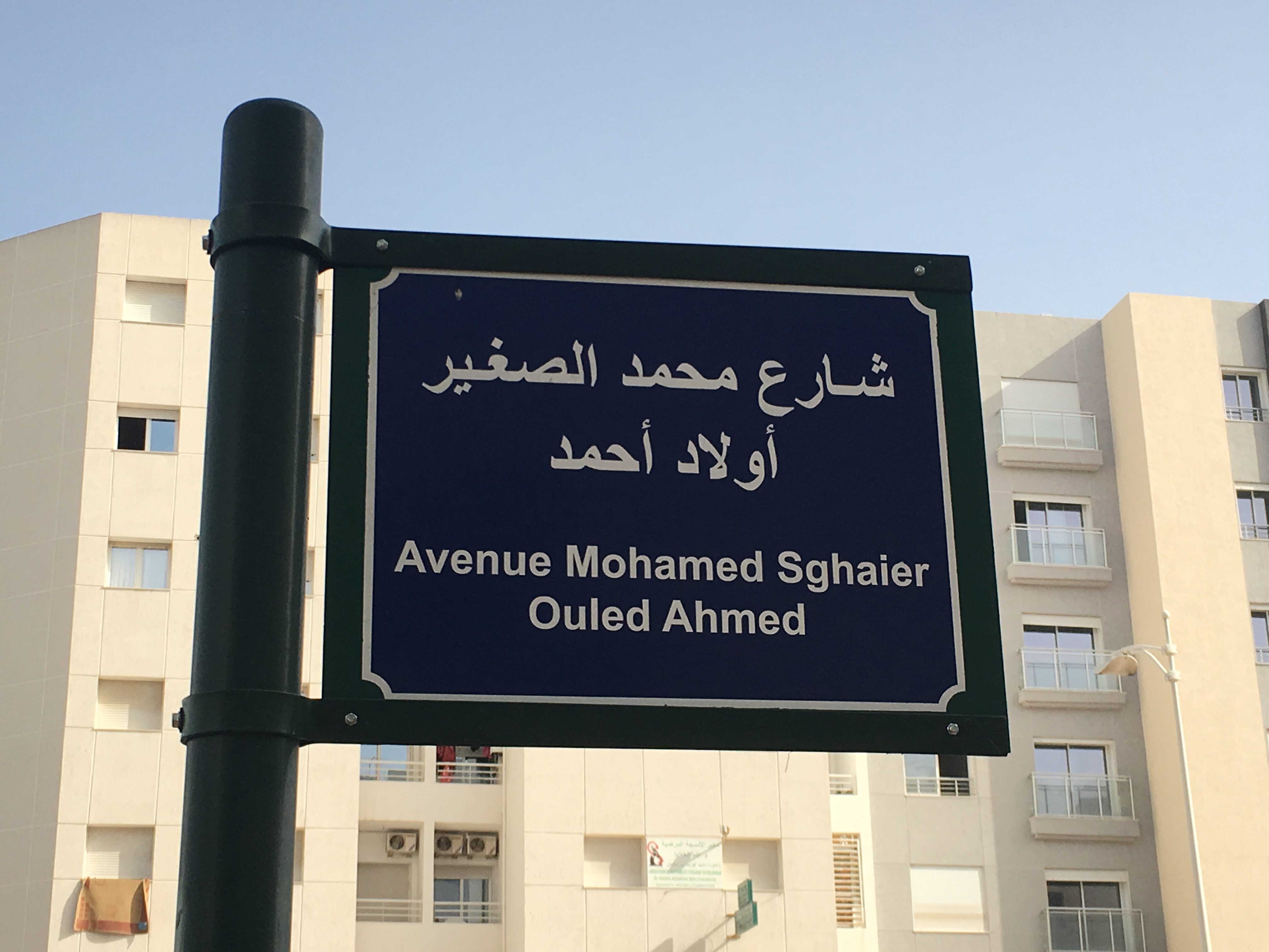 Avenue Mohamed Sghaier Ouled Ahmed (Centre Urbain Nord, Tunis), 2019.